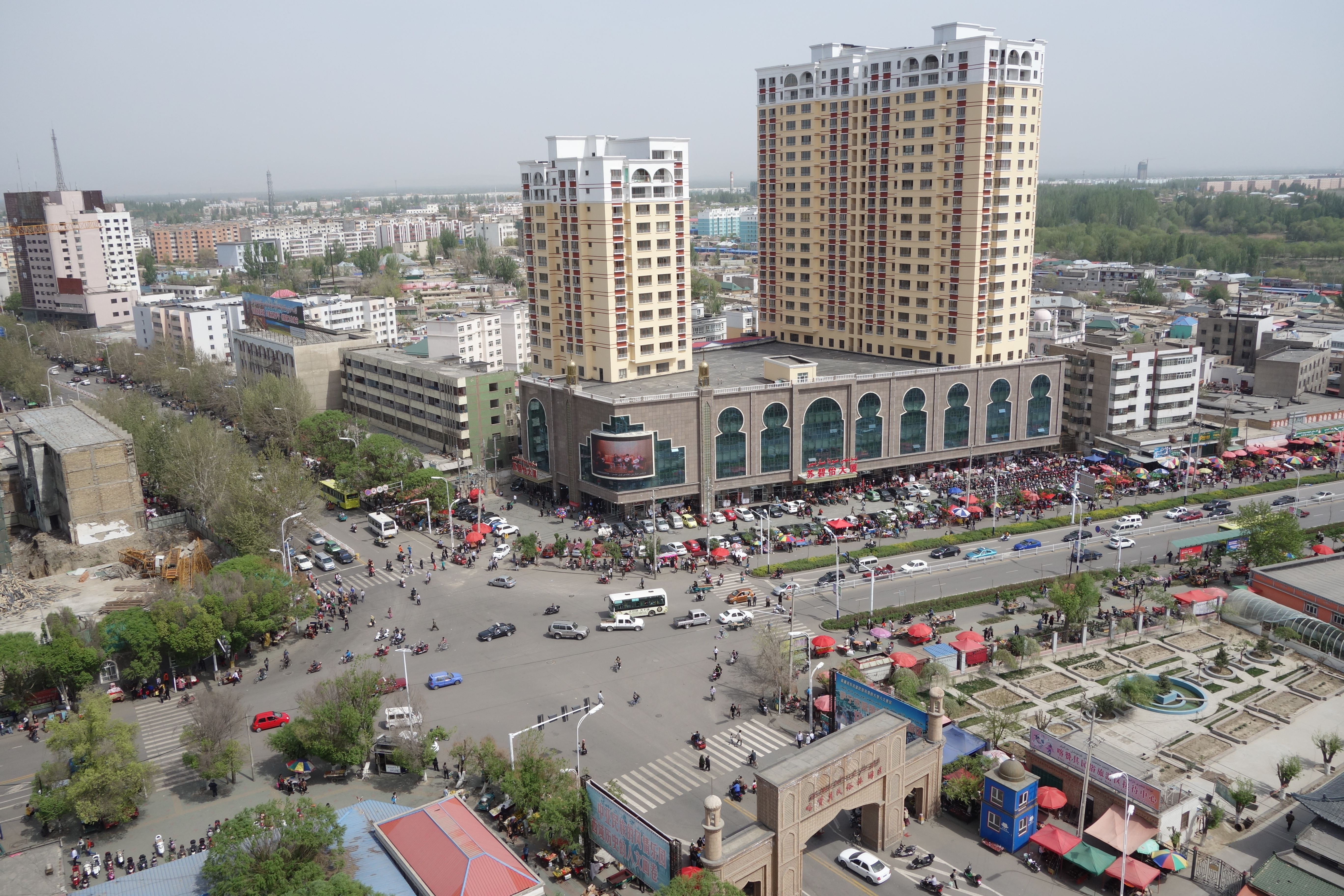 苏碧怡商厦